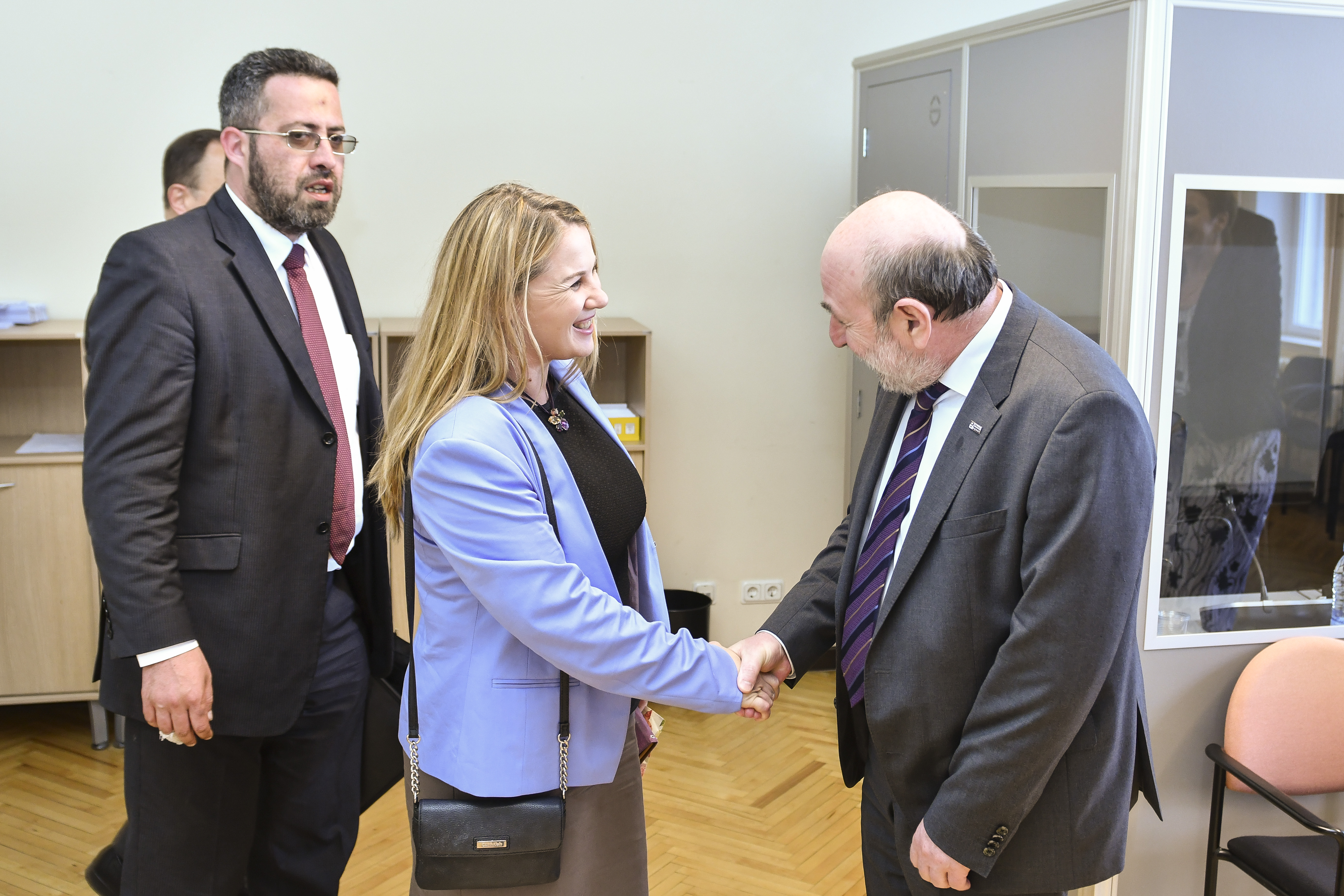 2017.gada 20.jūnijs. Saeimas deputātu grupas sadarbībai ar Izraēlas parlamentu grupas vadītāja Borisa Cileviča un grupas deputātu tikšanās ar Izraēlas Valsts Kneseta Izraēlas - Latvijas parlamentu sadarbības grupas vadītāju Kseniju Svetlovu (Ksenia Svetlova). Foto: Reinis Inkēns, Saeimas Administrācija Izmantošanas noteikumi: saeima.lv/lv/autortiesibas